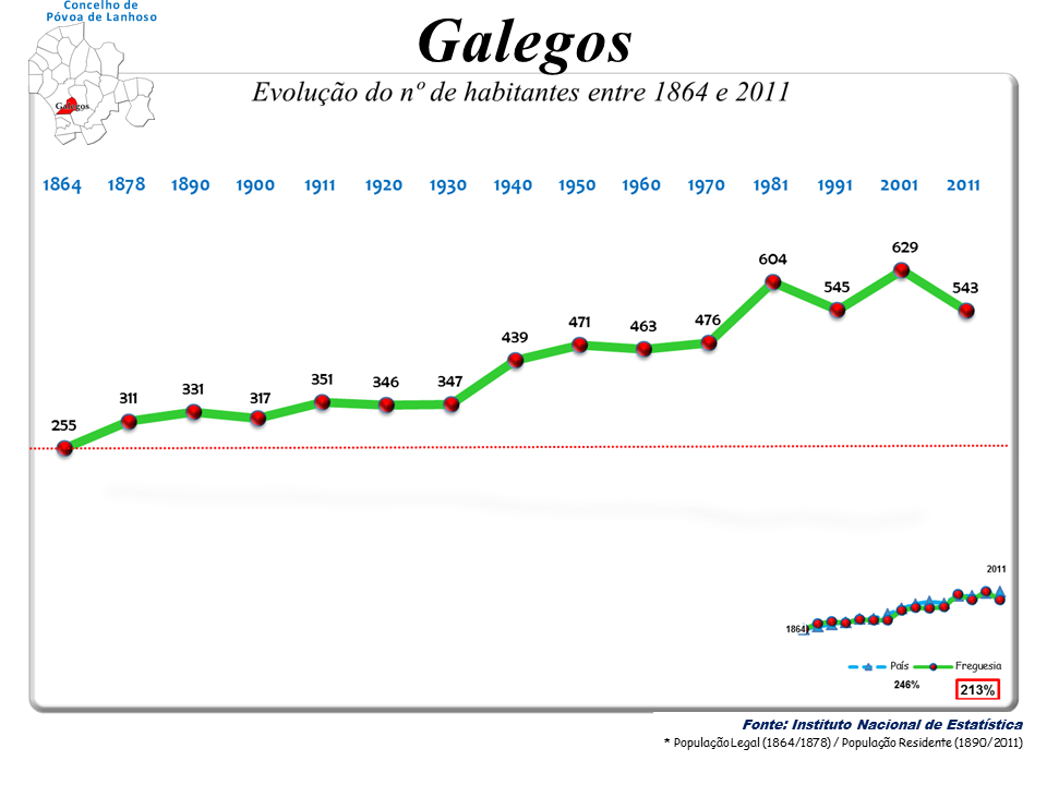 Censos 1864/2011